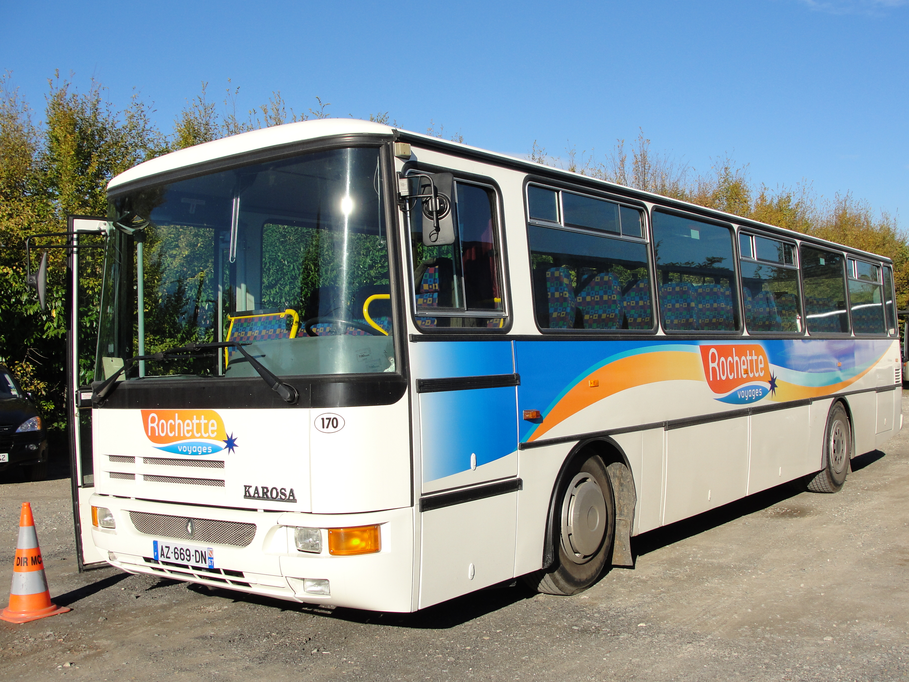 Poste de conduite Karosa Récréo - ce car d'origine tchèque reprend beaucoup d'éléments de la gamme poids lourds Renault, suite au rachat de son fabricant par l'entreprise française (devenue Irisbus). Héritage de sa naissance orientale, l'instrumentation est fournie par le hongrois KMGY. Noter à droite du contact, l'autocollant signalant la boîte à 5 rapports Praga.